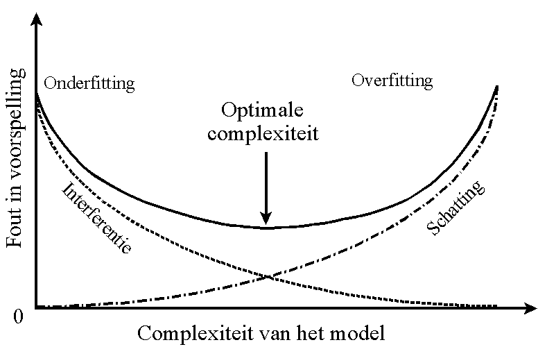 Deze figuur stelt de verschillende foutenbronnen voor bij multivariate calibratie. Een wiskundig model wordt gemaakt om de multivariate meetgegevens (signaal + interferentie) te beschrijven. Toevoegen van meer parameters aan het model laat in eerste instantie toe om betere voorspellingen te maken (interferentie wordt beschreven). Nadien verhoogt de voorspellingsfout van onafhankelijke data weer, wanneer te veel ruis mee in het model wordt opgenomen. Deze figuur is een vrije interpretatie naar Martens en Naes: Martens H.; Naes, T. Multivariate calibration, John Wiley and Sons, London, ISBN 0-471-90979-3, 1989 Categorie:Chemometrie